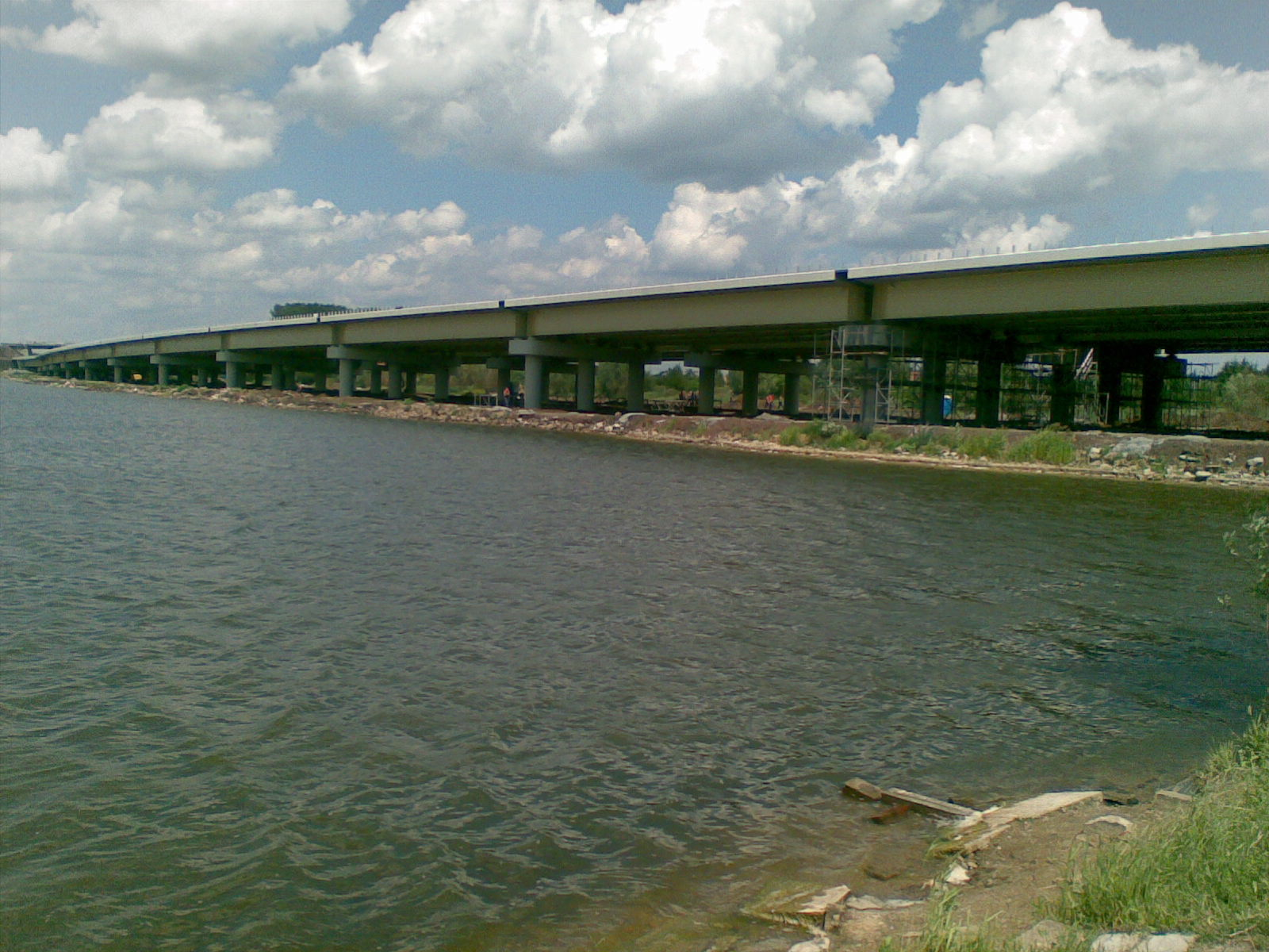 Estakada A1 nad stawem w Knurowie